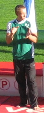 Juho-Matti Pimiä Kalevan kisoissa, Ratinan stadionilla, Tampereella, 26. heinäkuuta 2008